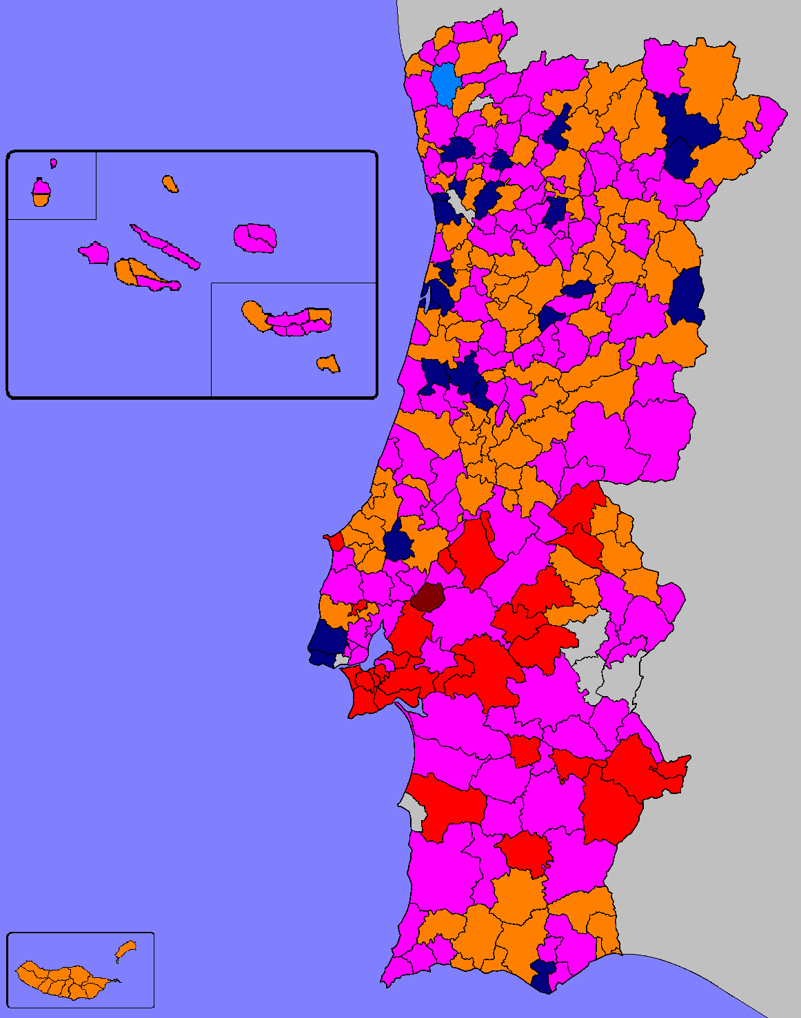 Mapa ilustrativo do partido mais votado por Concelho (Câmara Municipal)